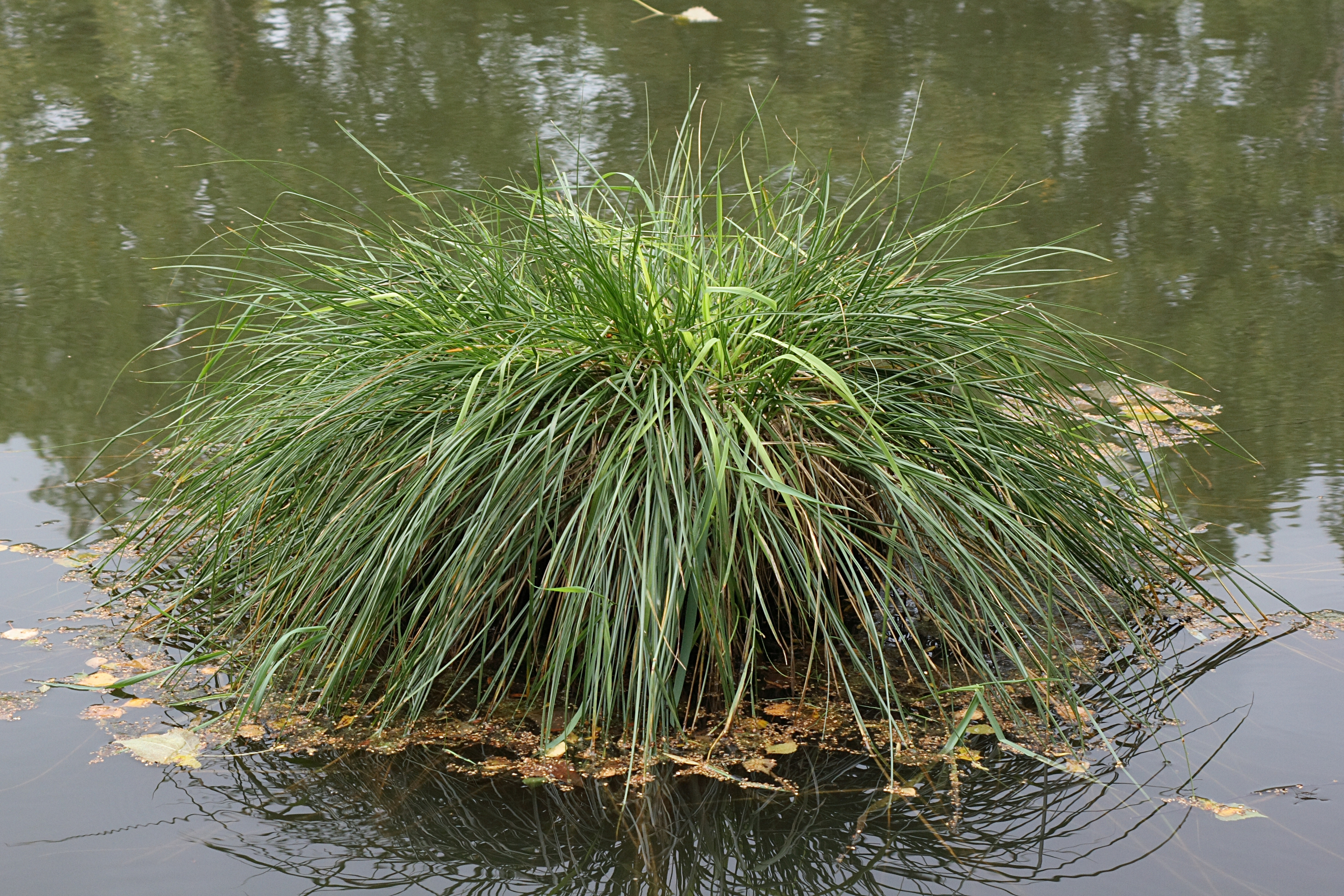 Trs ostřice latnaté v rybníčku v Břevské rákosině